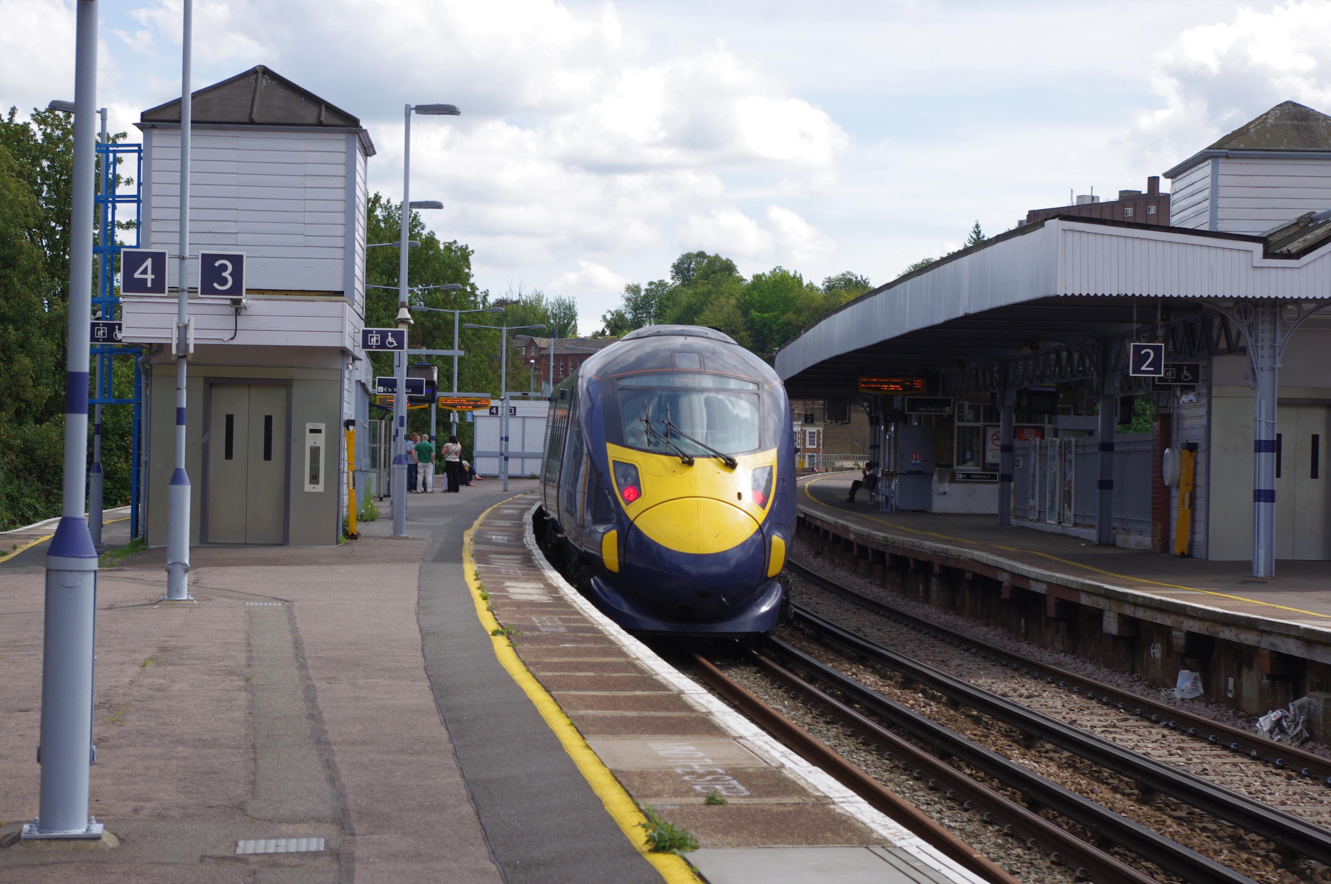 395013 at Rochester